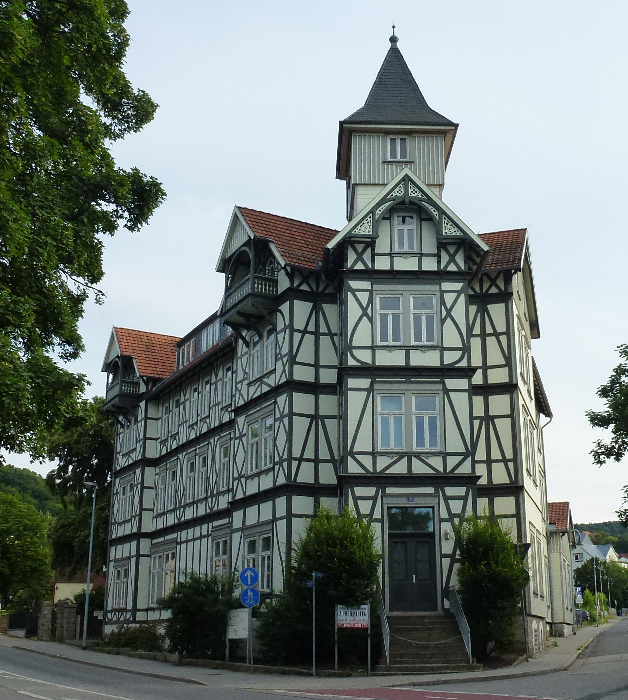 Ehemaliges Hotel Monopol in der Salzbergstraße 2 in Wernigerode